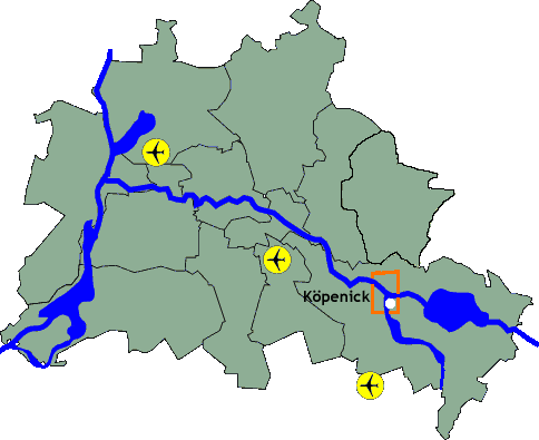 Lage der Insel Koepenick in Berlin